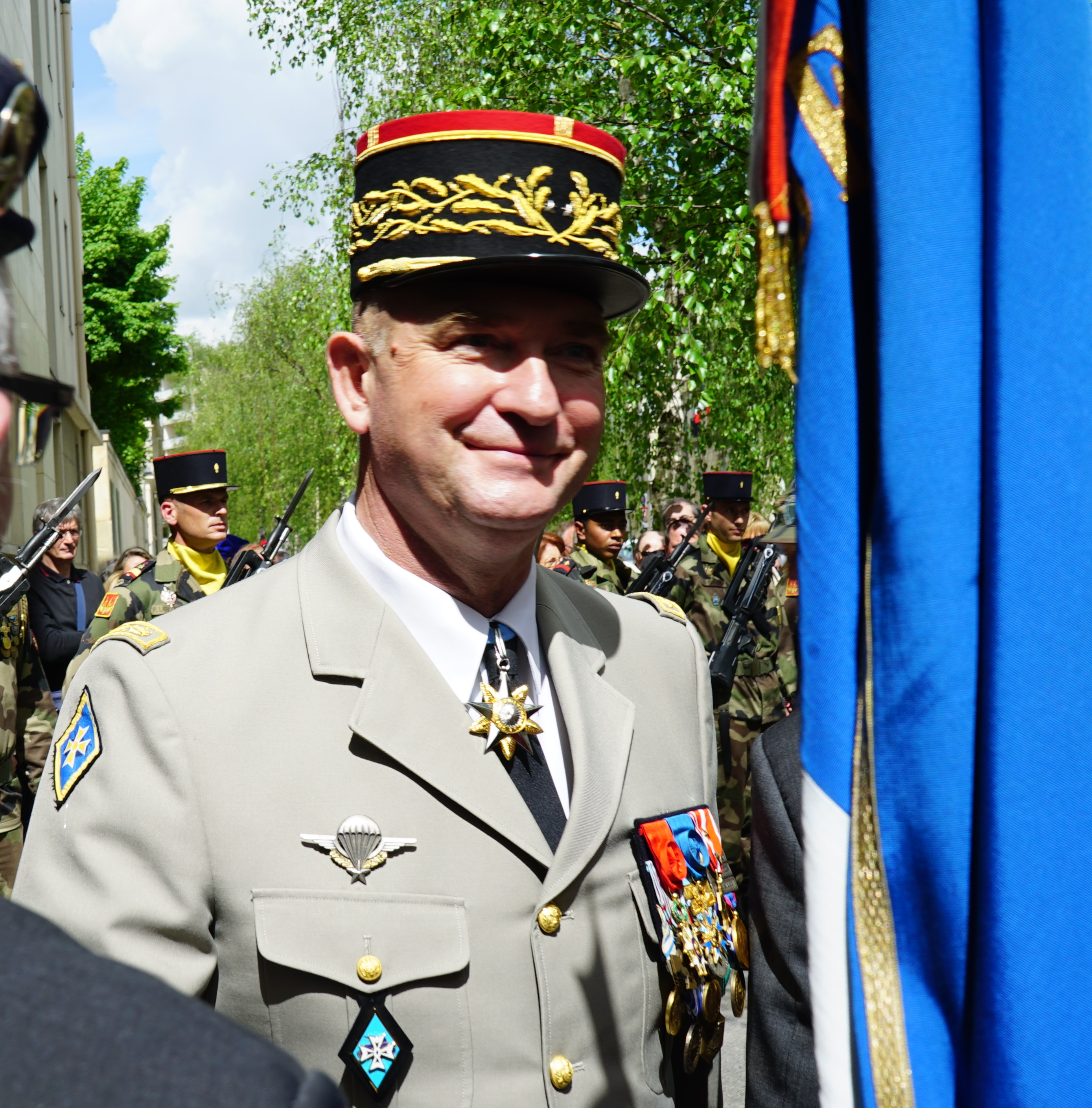 avrile 2015 commémoration de l'acte de reddition.